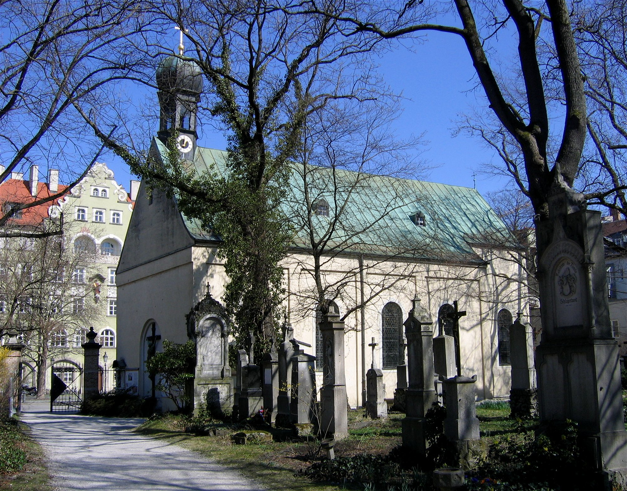 Alter Südfriedhof, München